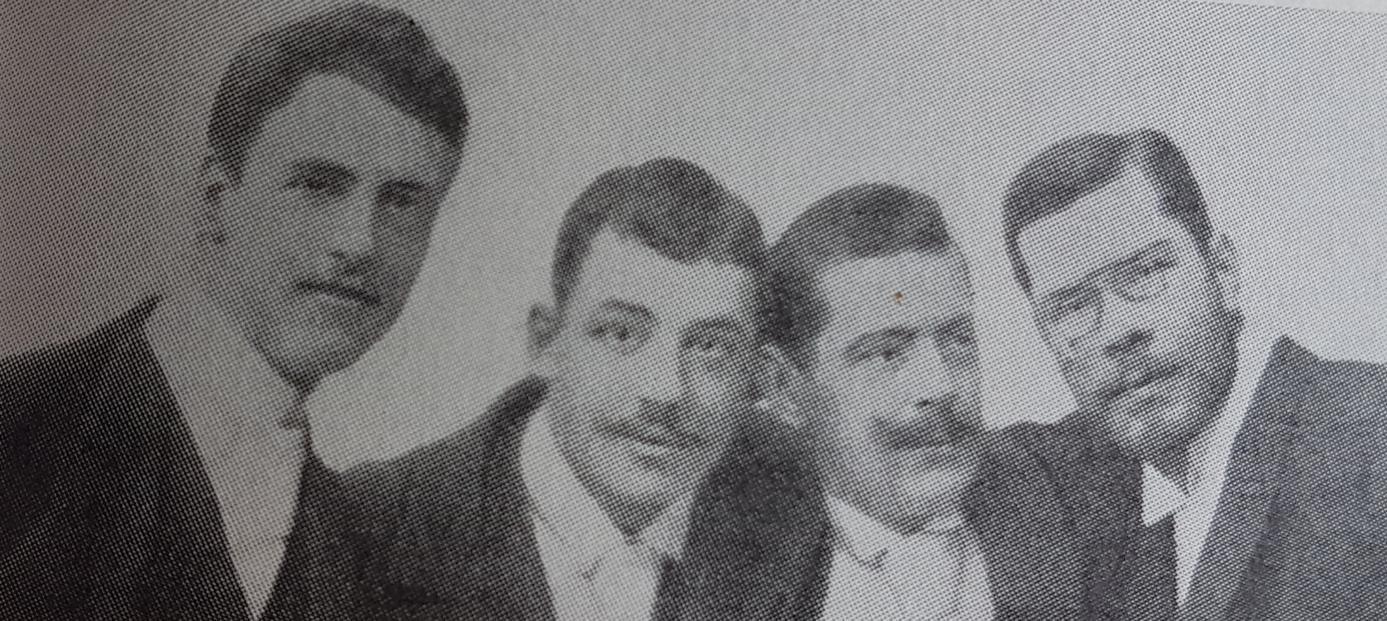 Akademielever från vänster Gunnar Åberg, Axel Sjöberg, Gösta Krehl och Arvid Nyholm omkring 1892., avfotograferad porträttbild från Allhems Svenskt konstnärslexikon.